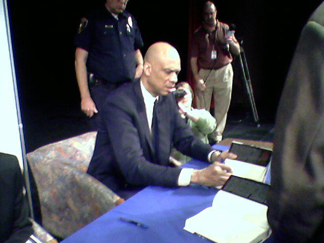 Kareem Abdul-Jabbar at a book signing.